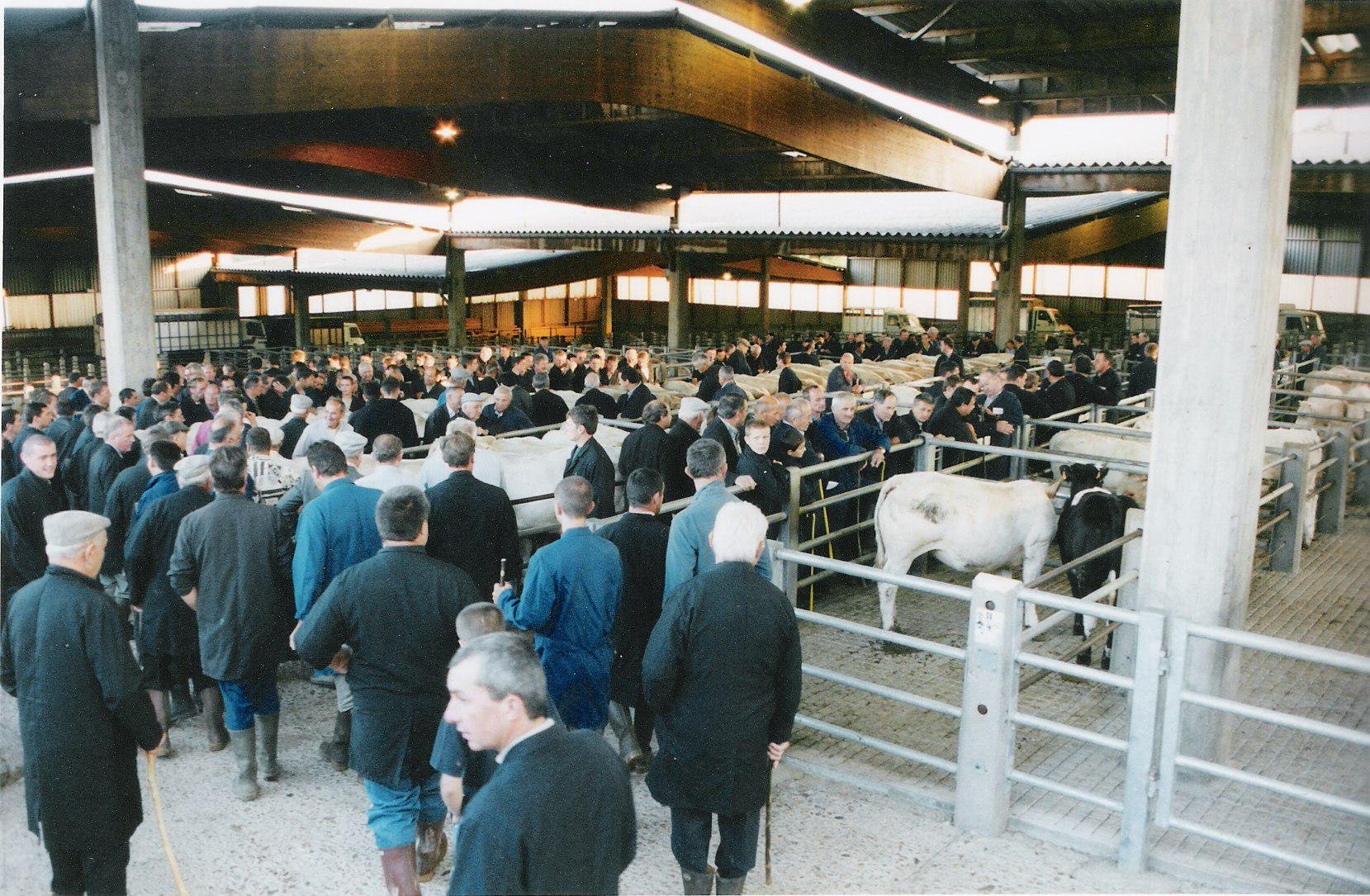 Le marché aux boeufs de Saint-Christophe-en-Brionnais (France)